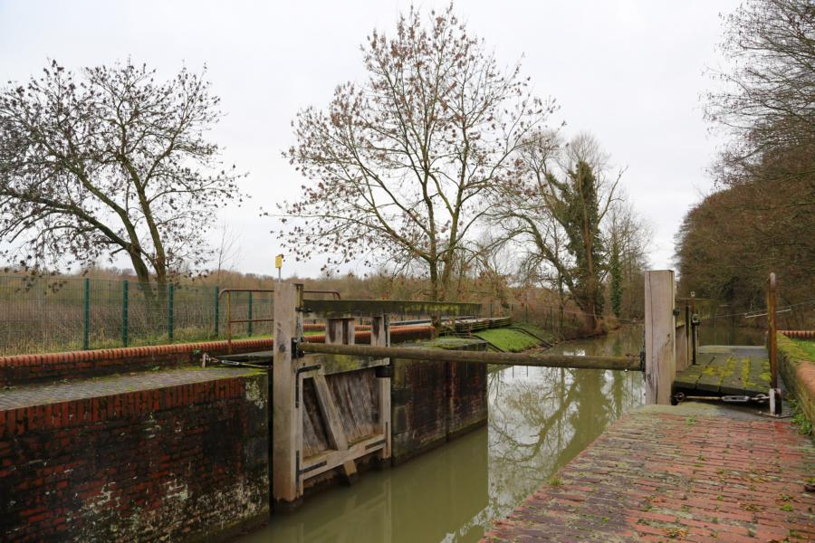 Die kleine Schleuse an Schloss Heessen wurde in der ersten Hälfte des 19. Jahrhunderts erbaut und gegen Ende des Jahres1826 in Betrieb genommen. Sie diente im Verbund mit 11 anderen Schleusen ähnlicher Bauart dazu, die Lippe zwischen Lippstadt und Wesel schiffbar zu machen.